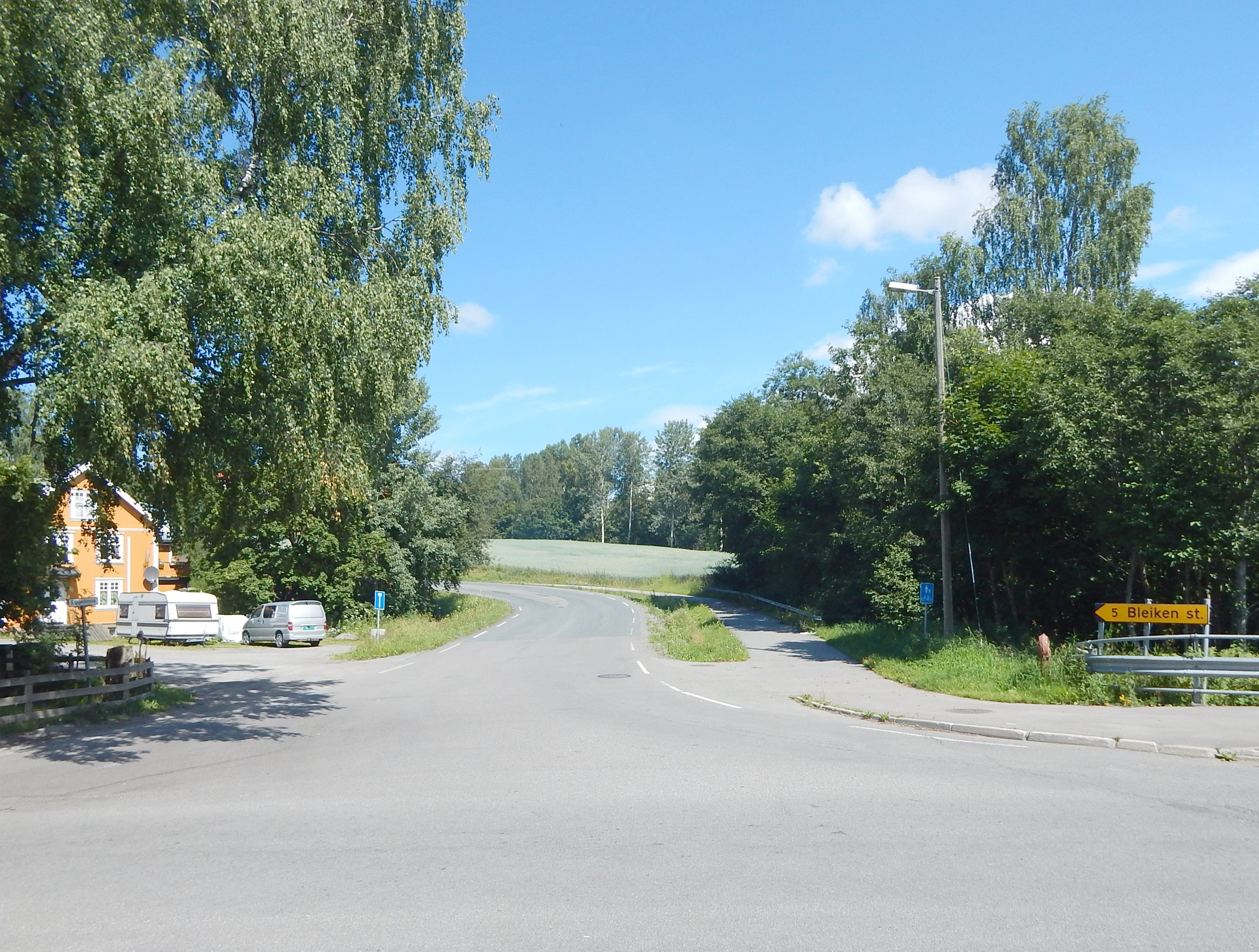 Eggelinna (fylkesvei 2316, tidl. 44) på Brandbu